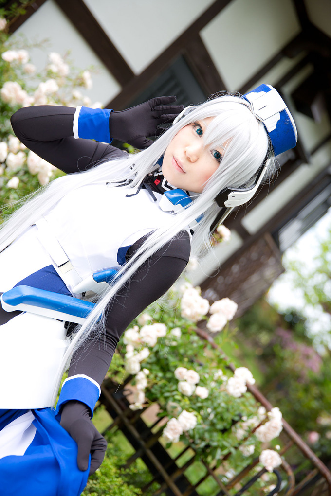 Cosplay de Horizon Ariadust personaje principal femenino de Kyōkai Senjō no Horizon en Japón.